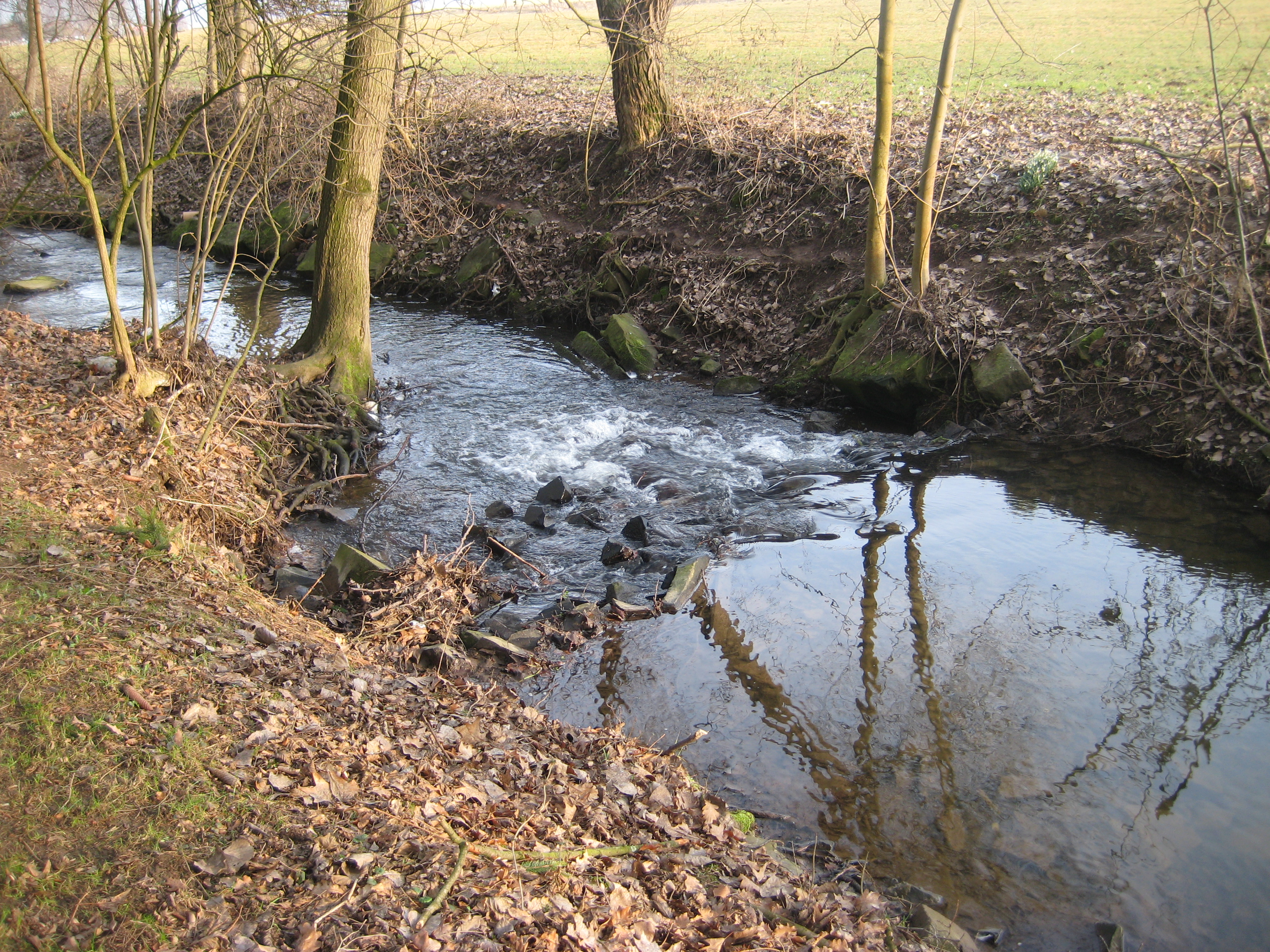 Lempe im Frühling